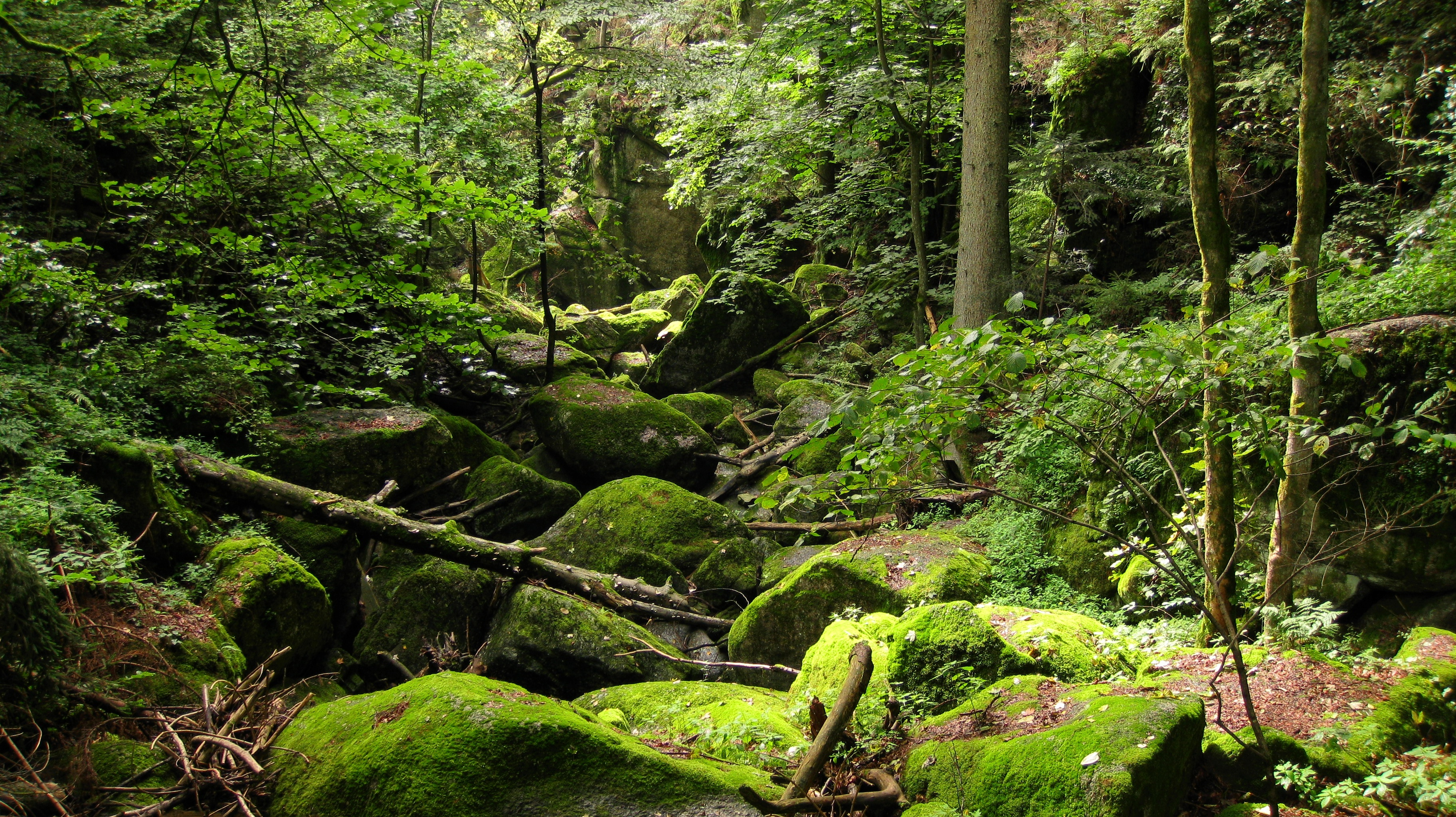 Stillensteinklamm bei Grein/Donau